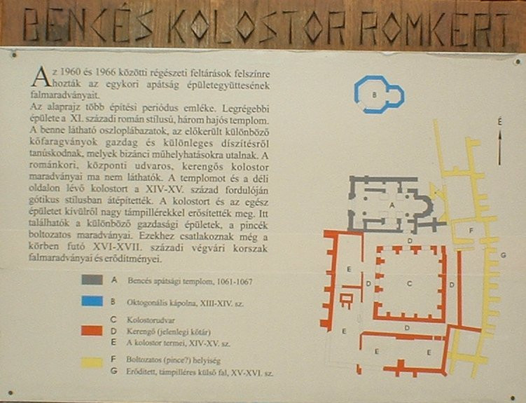 Szent Jakab apátság romjai (Kaposvár, KAPOSSZENTJAKAB)